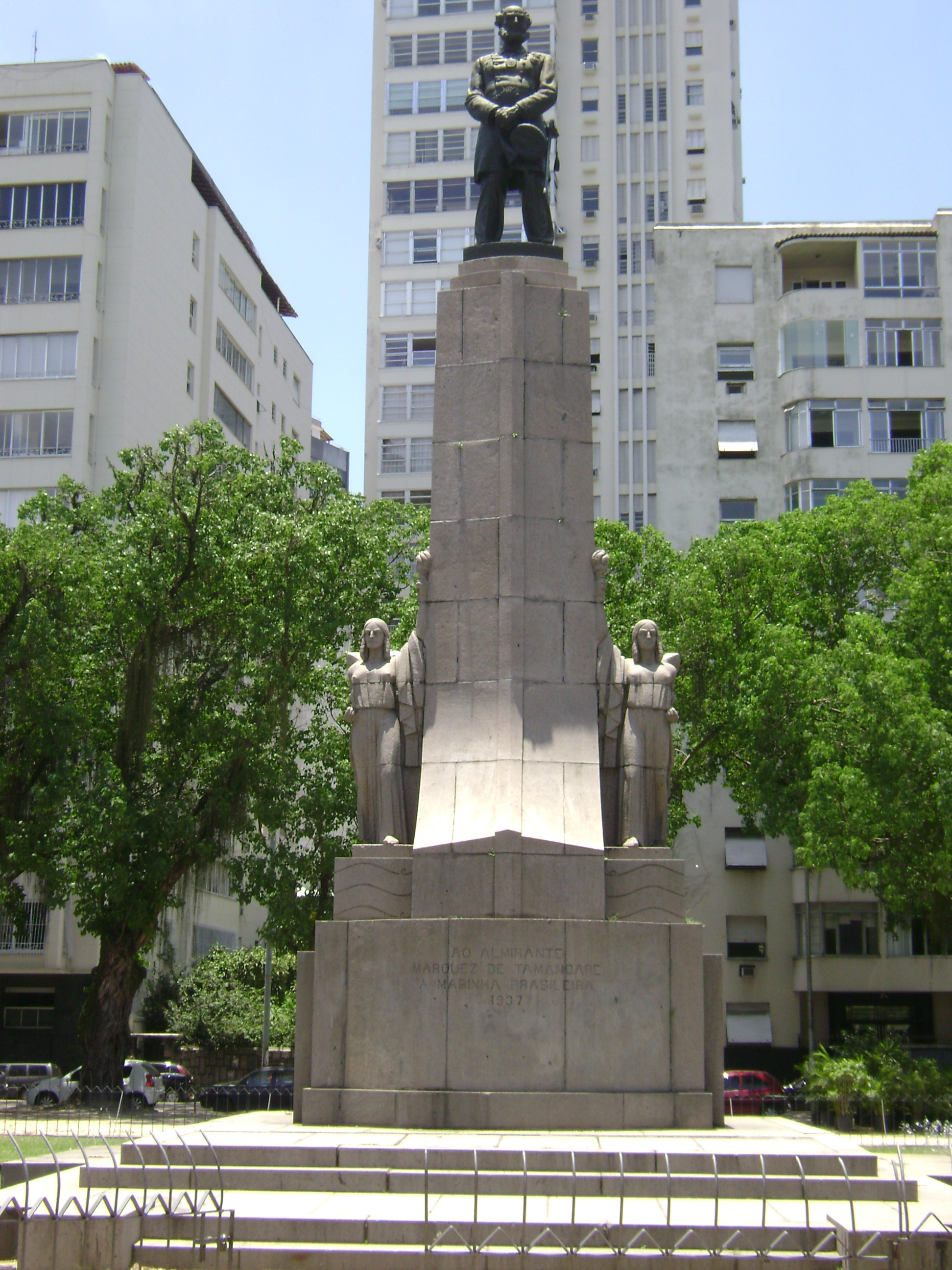 Homenagem a Tamandaré na cidade do Rio de Janeiro, Brasil